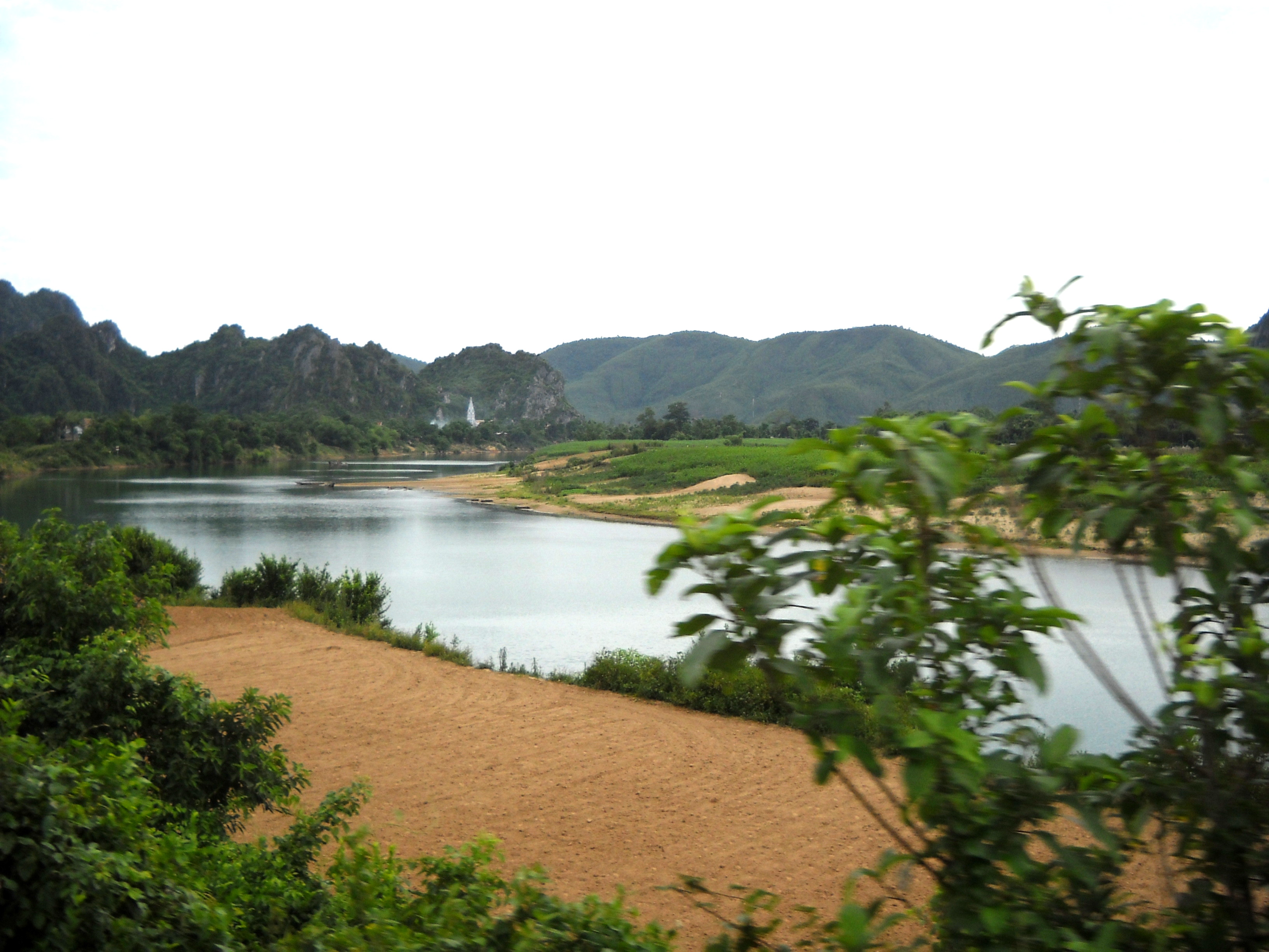 Sông_Gianh,_đoạn_qua_Tuyên_Hóa,_Quảng_Bình